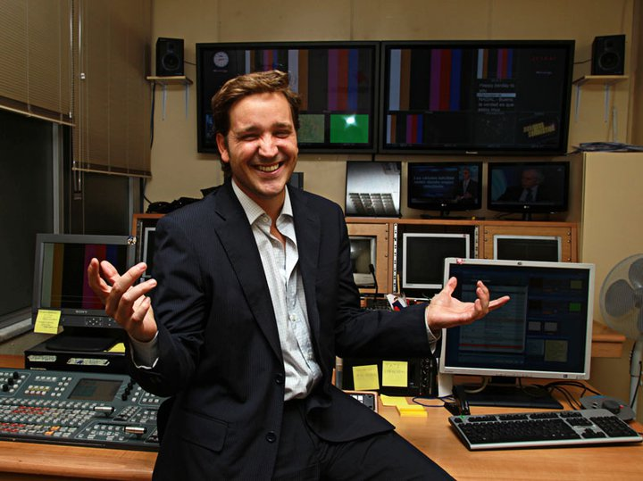 Marcial Cuquerella en uno de los controles de Intereconomía Televisión